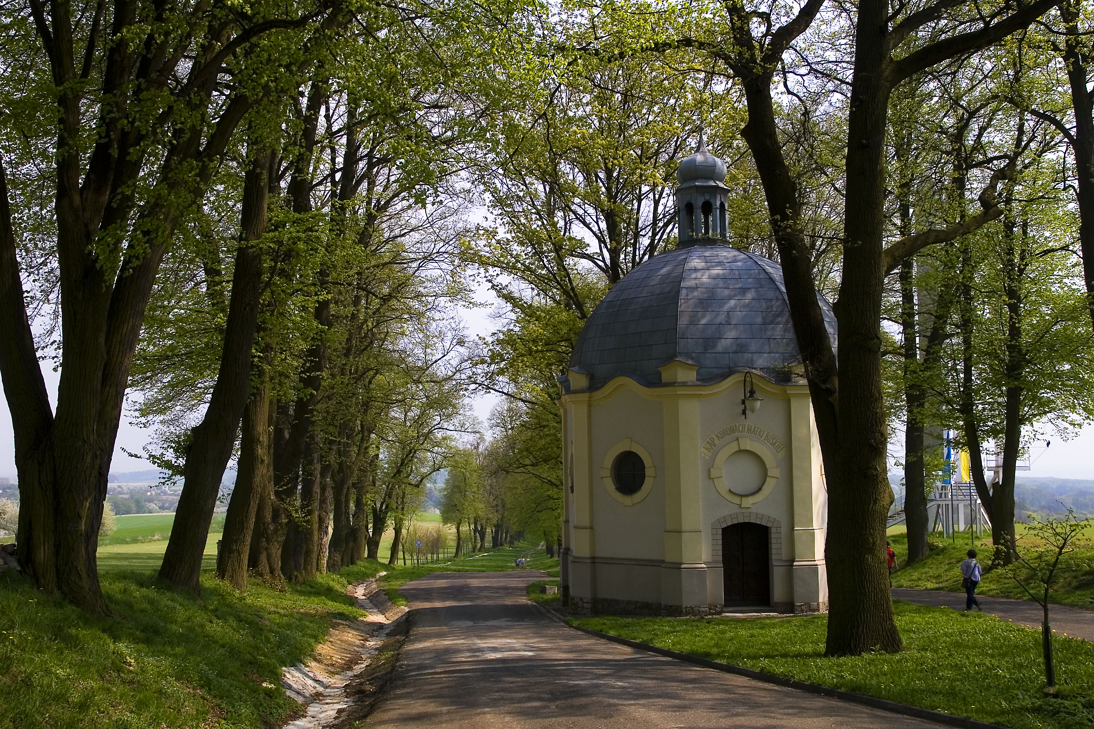 Góra św. Anny, kaplica Koronacji Matki Boskiej, Gmina Leśnica, powiat strzelecki